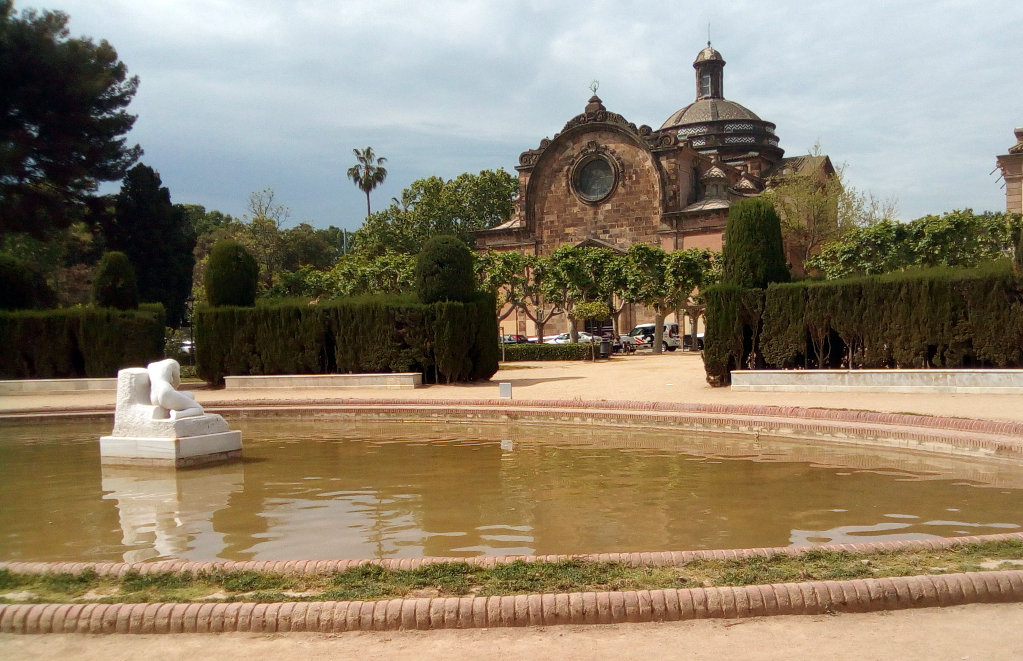 Iglesia castrense de Barcelona.